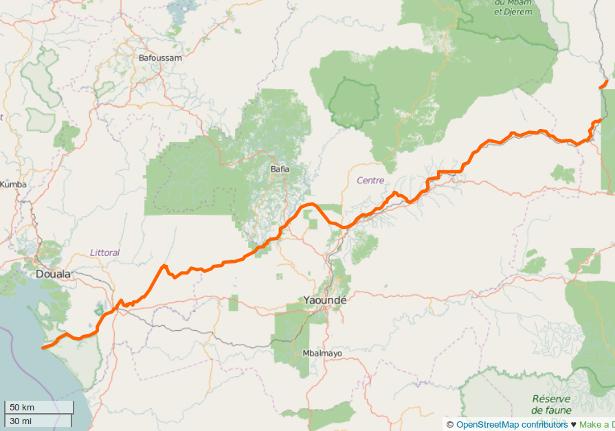 Cours de la Sanaga au Cameroun (OSM). This map may be incomplete, and may contain errors. Don't rely solely on it for navigation.